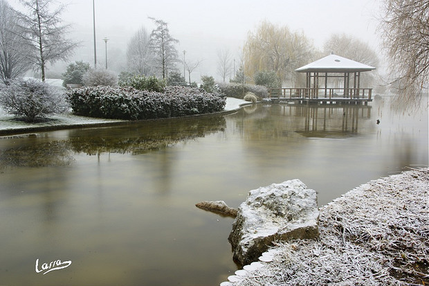 Una muestra de los frios que hemos pasado estas Navidades en Pamplona. Parque Yamaguchi sumido en la niebla con el toque de la centellada nocturna. DATOS EXIF: Cámara Pentax K10D. Sigma 18-200. Focal: 22mm. Apertura: F16 Velocidad 1,4s ISO: 100 Iluminación: Natural a través de ventana. Editor: UFRaw + Gimp.